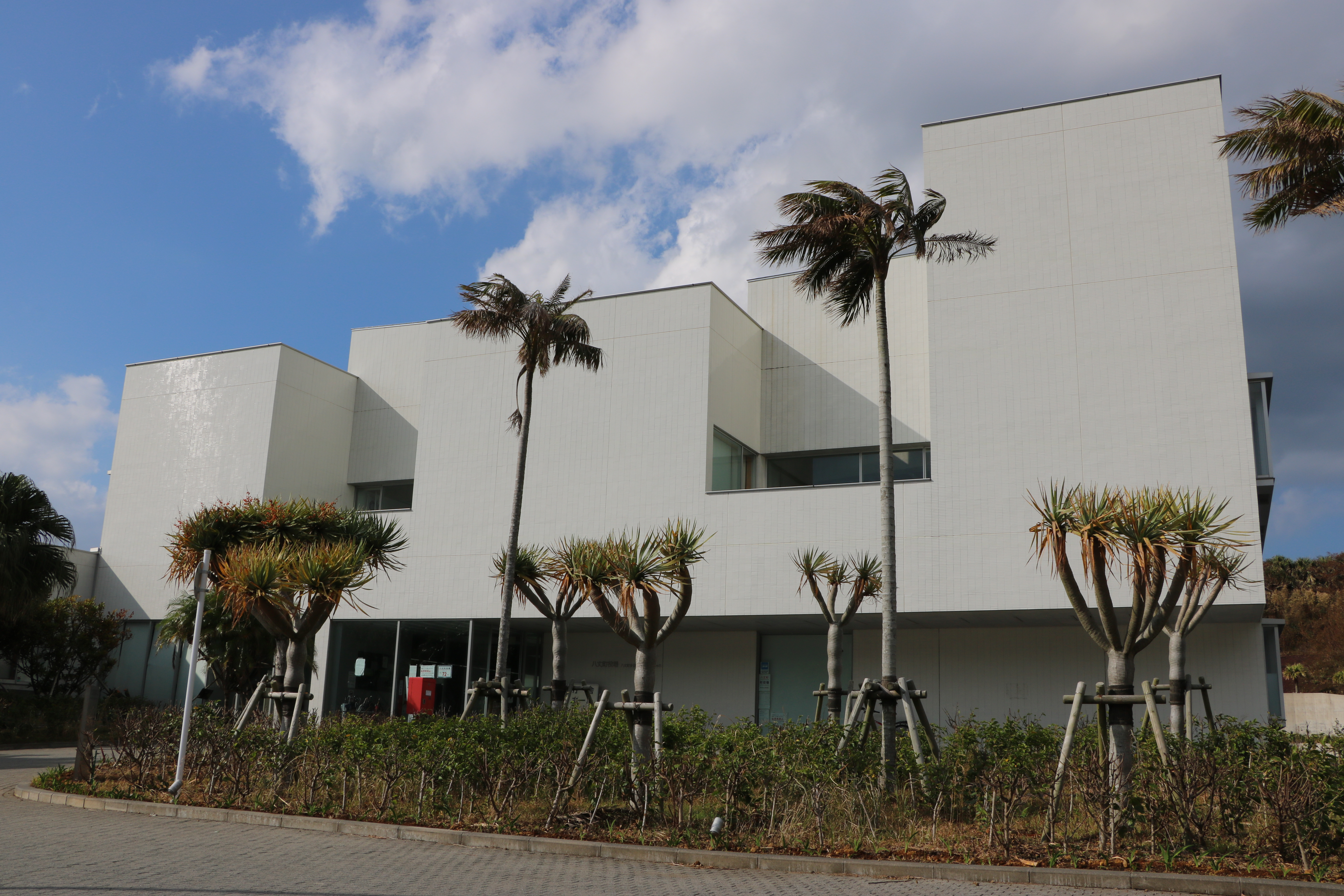 八丈町役場（東京都八丈町）